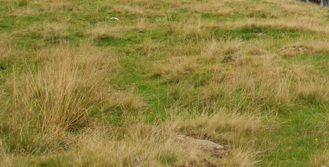 Borstgraswiese beim Hebalmschutzhaus